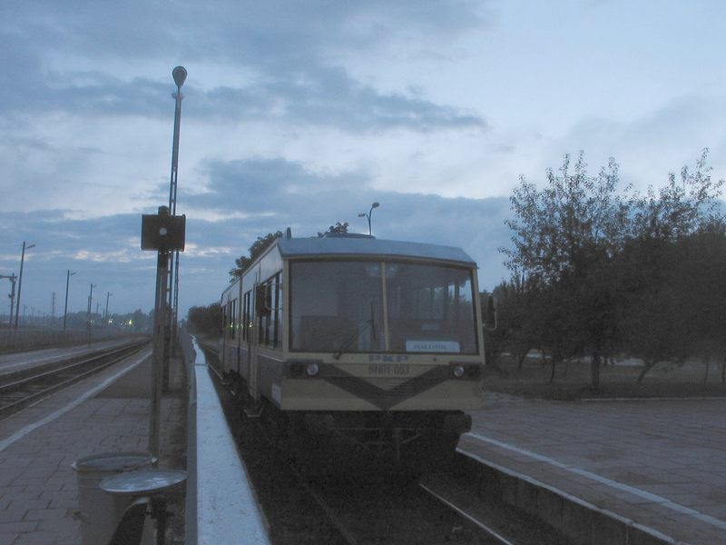 SN81 czeka na stacji Czeremcha aż stanie się pierwszym rannym pociągiem do Białegostoku